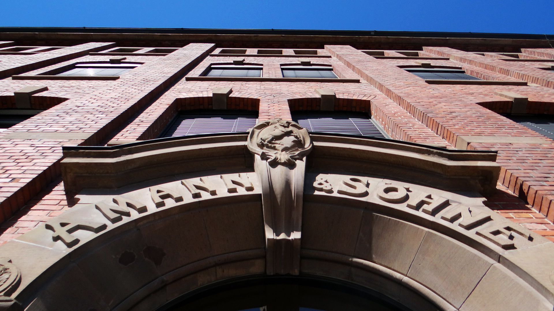 Eingang des AMANN Unternehmenshauptsitzes in Bönnigheim